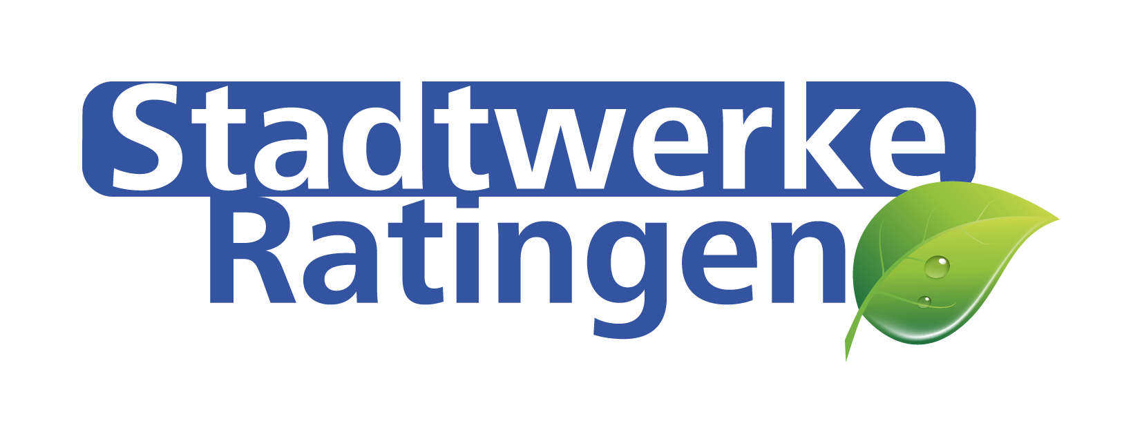 Logo der Stadtwerke Ratingen GmbH